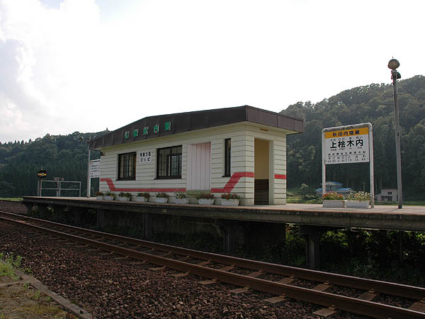 Kami-Hinokinai Station, on the Akita Nairiku Jūkan Railway Akita Nairiku Line, Semboku, Akita, Japan